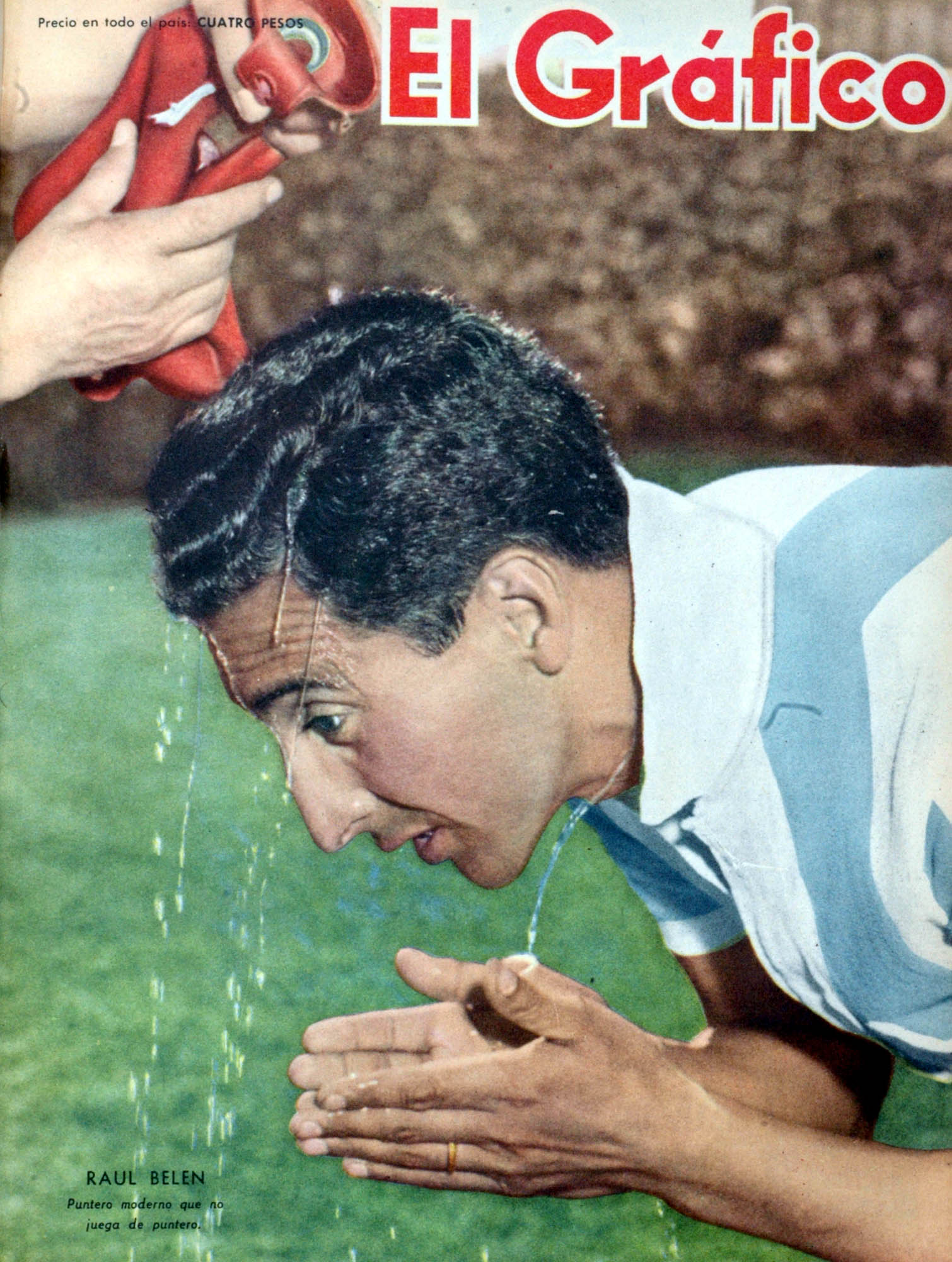 El Grafico del 02 de Abril de 1959. Edicion 2064